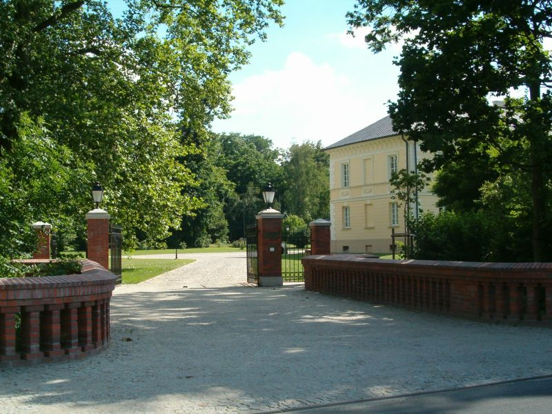 Dobrzyca, ul. Pleszewska 5A - pałac z lat 1789-1790, brama główna (zabytek nr A/7)